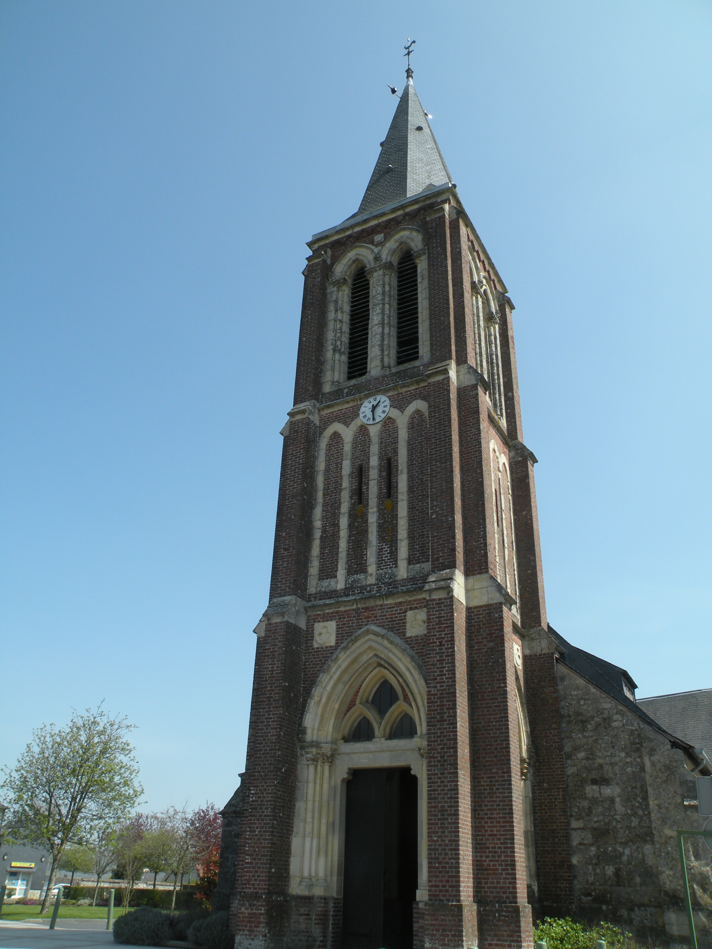 Église de Saint-Gatien-des-Bois.